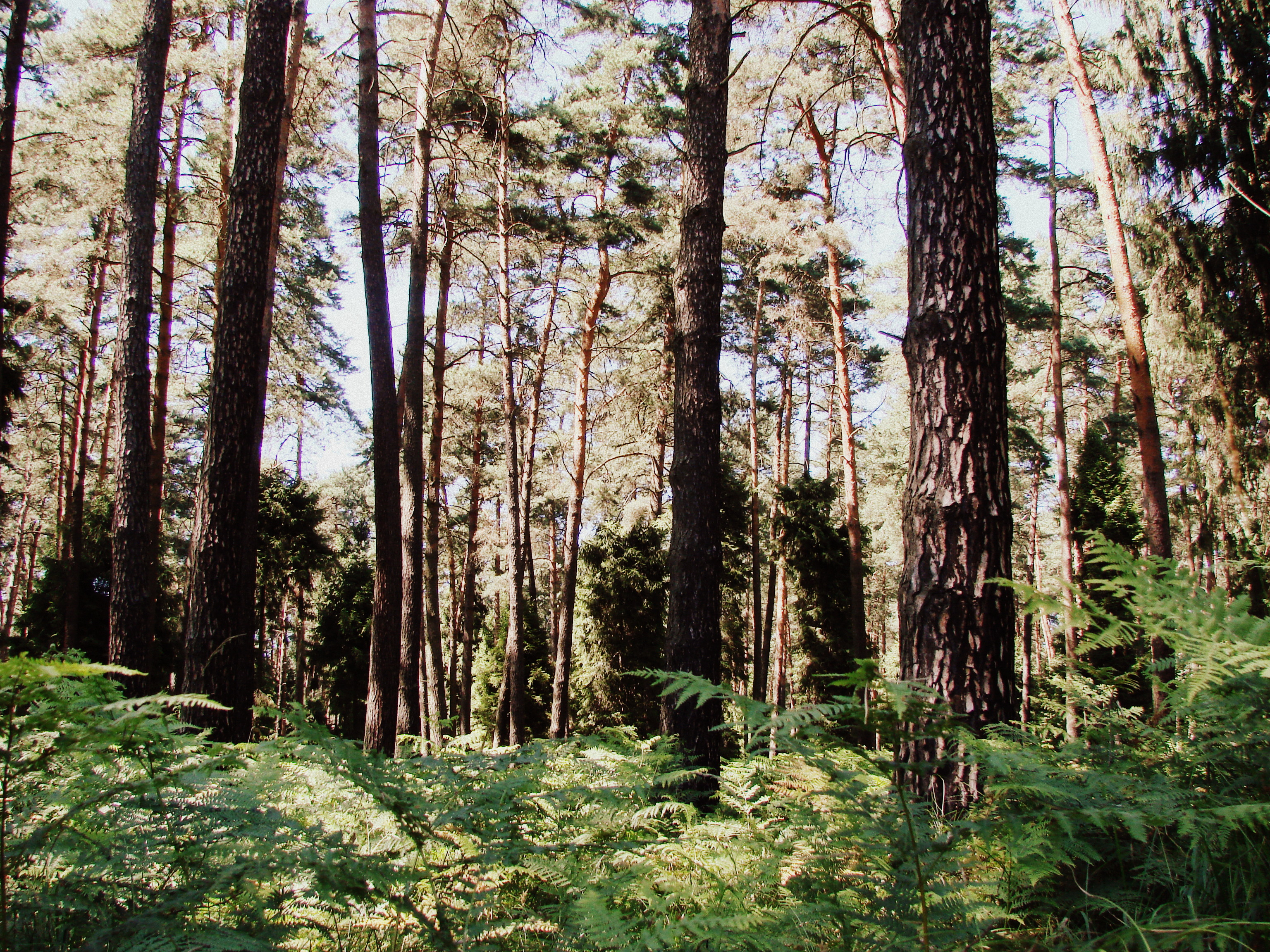 Las na Żwakowie.